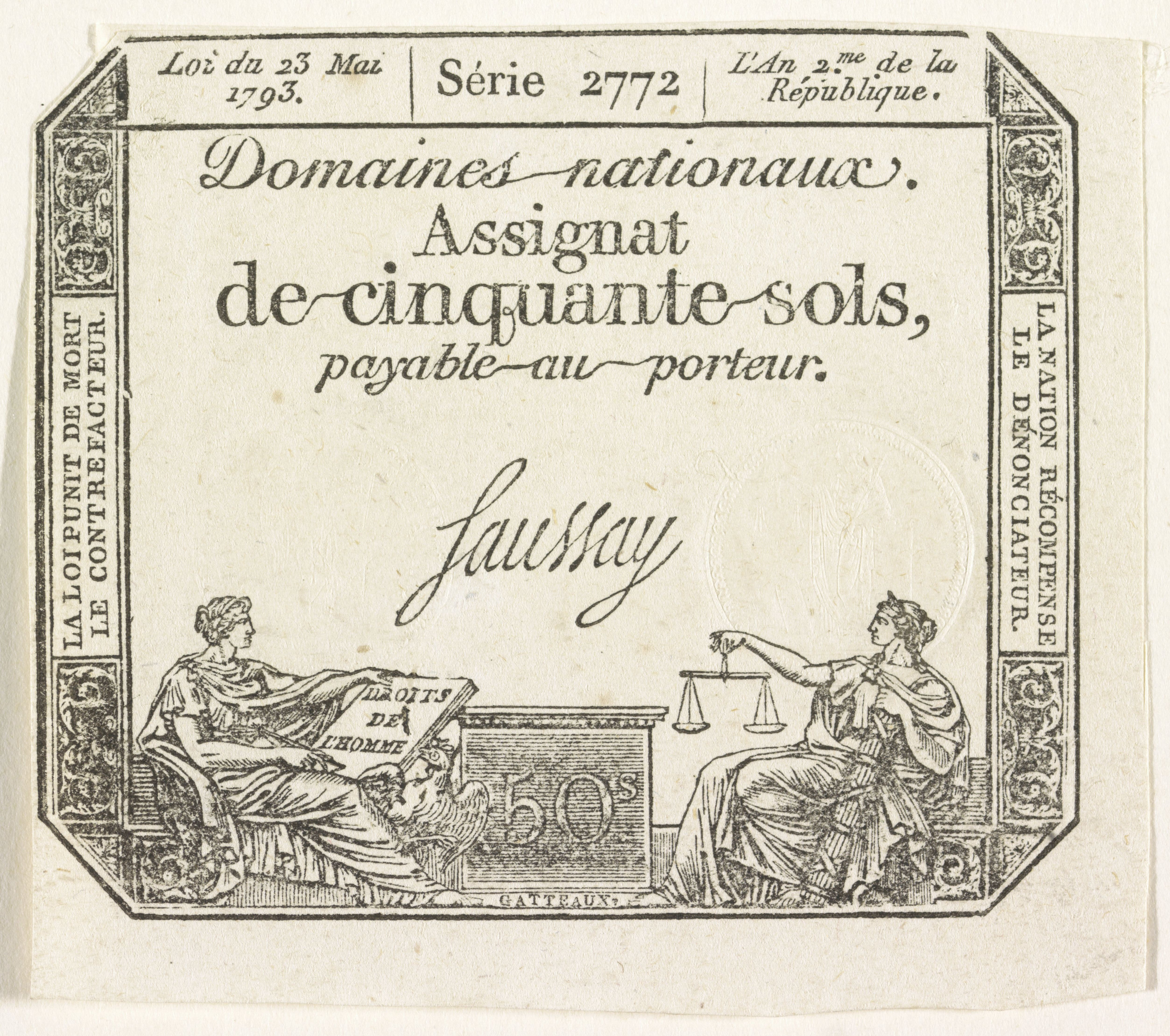 IdentificatieTitel(s): Asignaat van 50 sols, 1793Assignat de cinquante sols (titel op object)Objecttype: prent assignaat Objectnummer: RP-P-OB-86.594-27Catalogusreferentie: FMH 5435Atlas van Stolk 5353Opschriften / Merken: verzamelaarsmerk, verso, gestempeld: Lugt 2228Omschrijving: Franse assignaat van 50 sols. In omloop gebracht door de Domaines Nationaux, serie 2772, volgens de wet van 23 mei 1793.VervaardigingVervaardiger: uitgever: Domaines nationauxPlaats vervaardiging: FrankrijkDatering: 1793Fysieke kenmerken: houtsnede en blinddrukMateriaal: papier Techniek: houtsnede / blinddrukAfmetingen: blad: h 80 mm × b 90 mmOnderwerpWat: bank-noteFranse RevolutieWanneer: 1790 - 1796Verwerving en rechtenVerwerving: aankoop 1881Copyright: Publiek domein